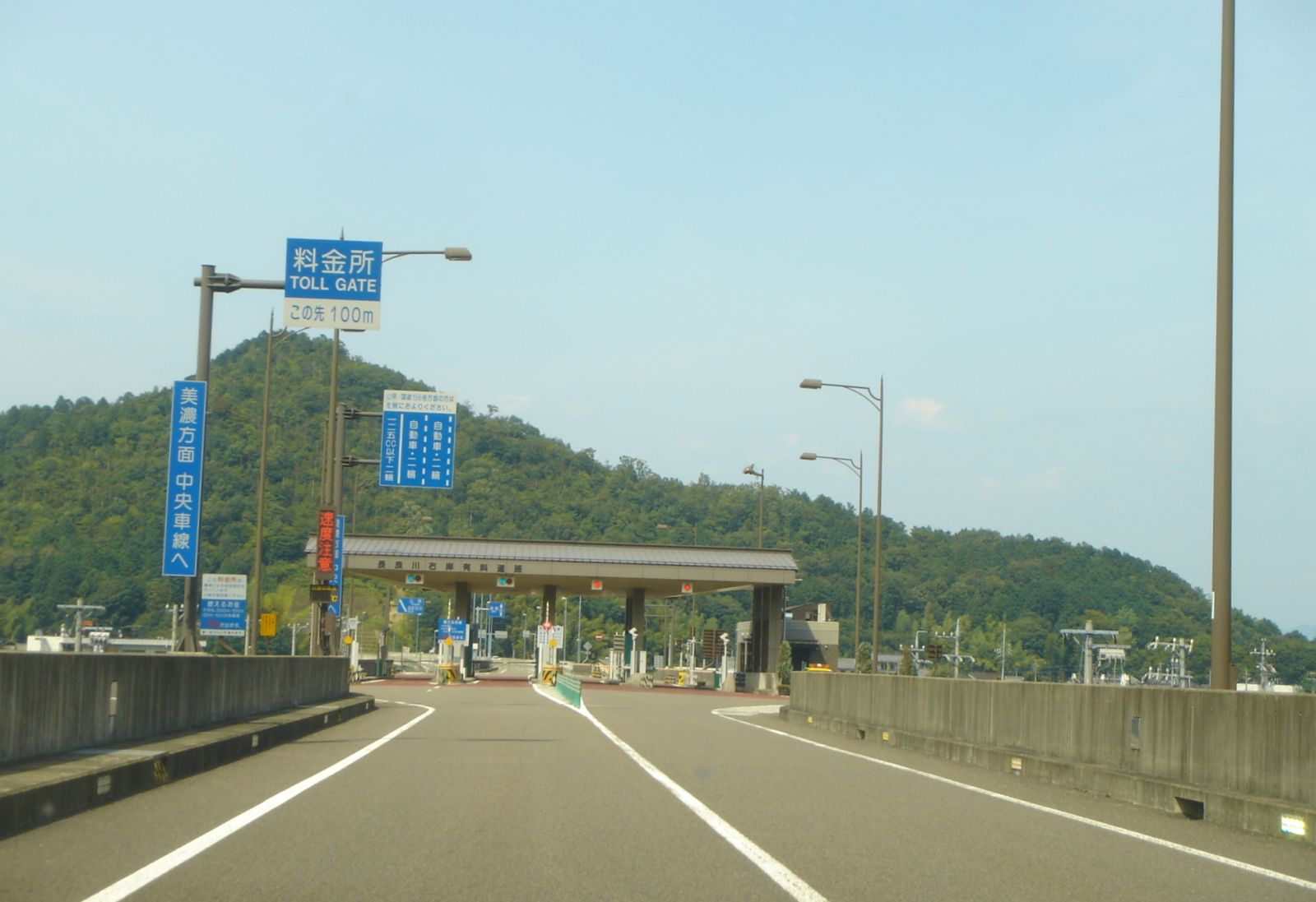 長良川右岸有料道路(岐阜県道94号岐阜美濃線の一部)の料金所,岐阜県岐阜市